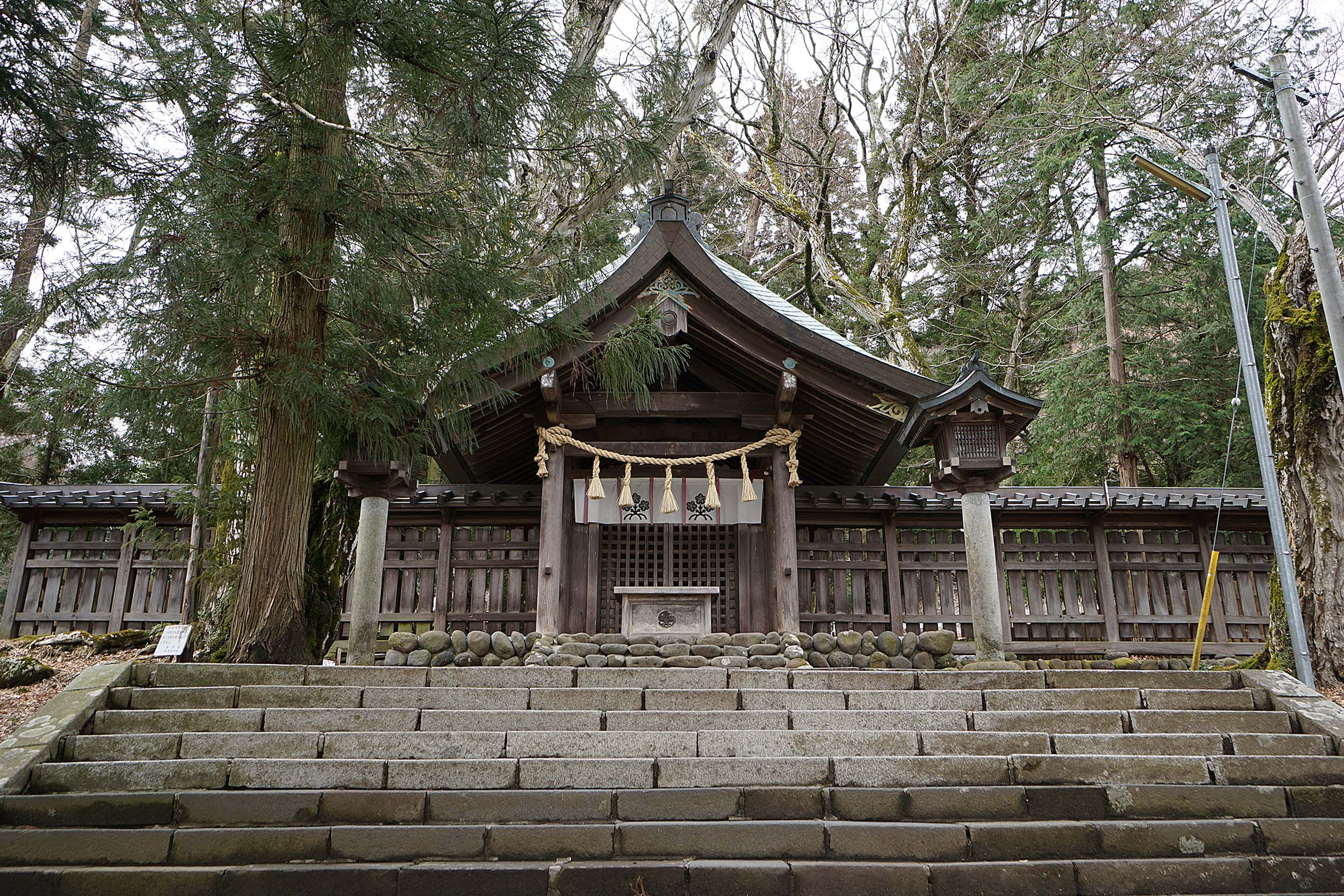 Suwa taisha Kamisha Maemiya , 諏訪大社 上社 前宮